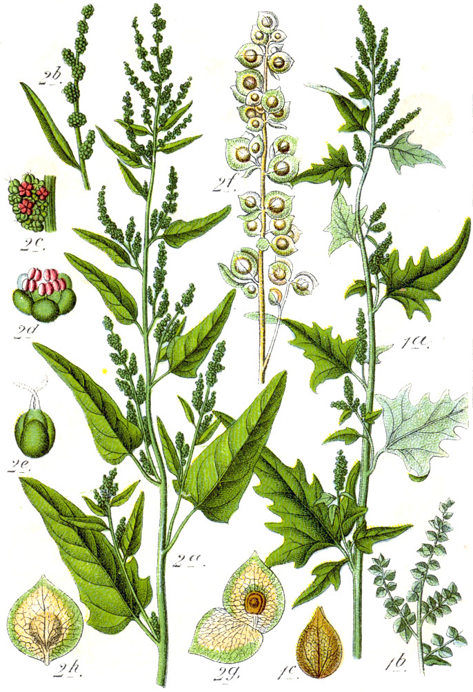 1. : Glanz-Melde, Atriplex sagittata Borkh., syn. A. nitens Schkuhr FloraWeb.de: Glanz-Melde, Atriplex sagittata Borkh. 2. : Garten-Melde, Atriplex hortensis L. FloraWeb.de: Garten-Melde, Atriplex hortensis L. Original Caption 1. Glanz-Melde, Chenopodium dubium nitens 2. Garten-Melde, Chenopodium hortense